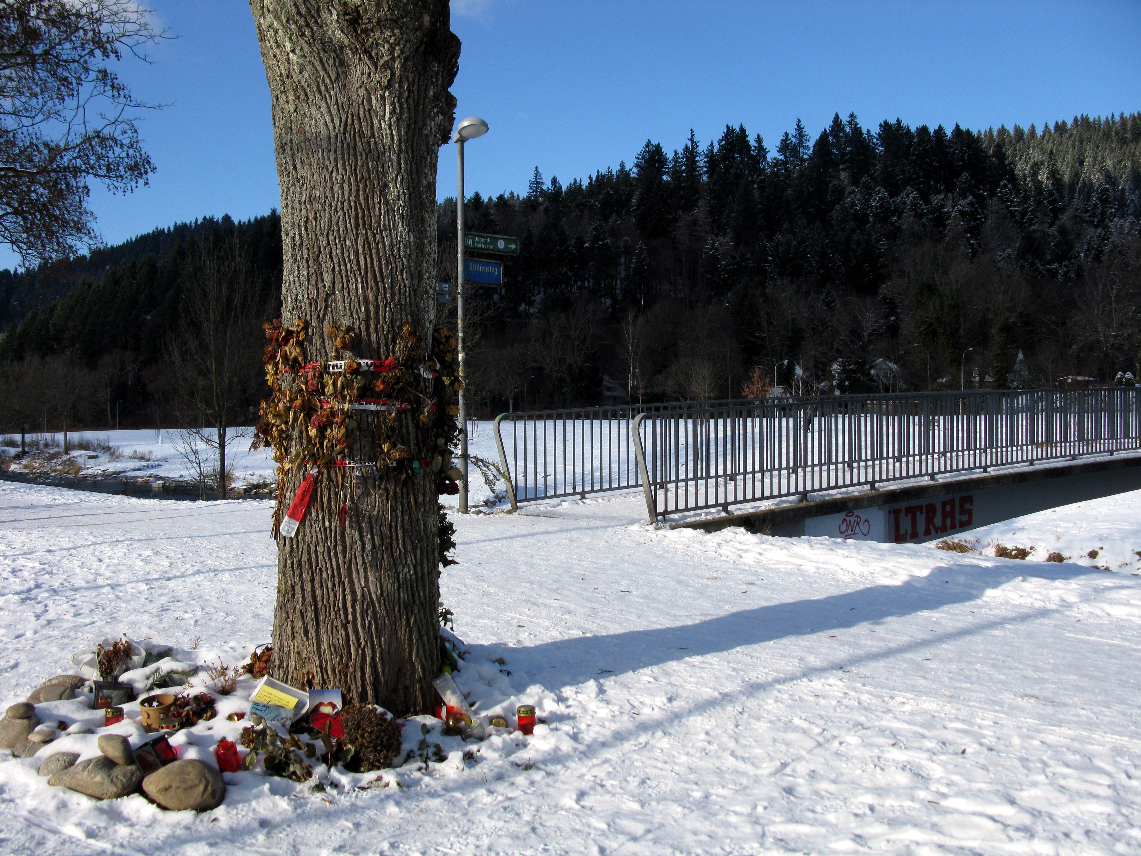 Ottiliensteg mit Gedenkbaum an der Dreisam in Freiburg-Waldsee, in der Nähe des Ortes wo die getötete Maria L. gefunden wurde